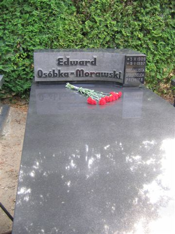 Edward Osóbka-Morawski's monument (Powązki Cemetery; Cmentarz Komunalny, d. Wojskowy)